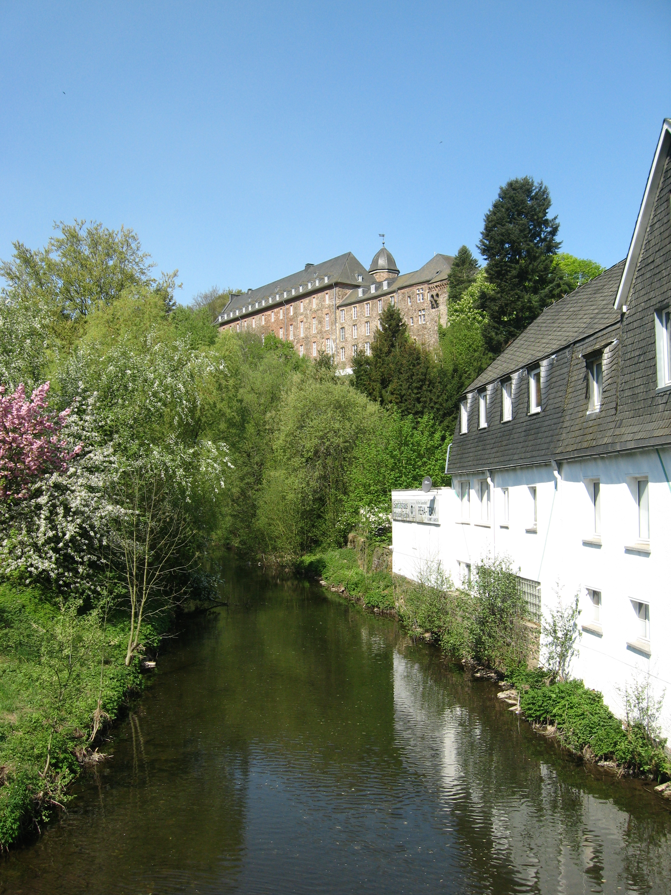 Schleiden, Schloss (talseitig) Datum: 25.04.2011 Urheber: M. Pfeiffer alias Benutzer:Gordito1869 Quelle: privates Fotoarchiv des Urhebers